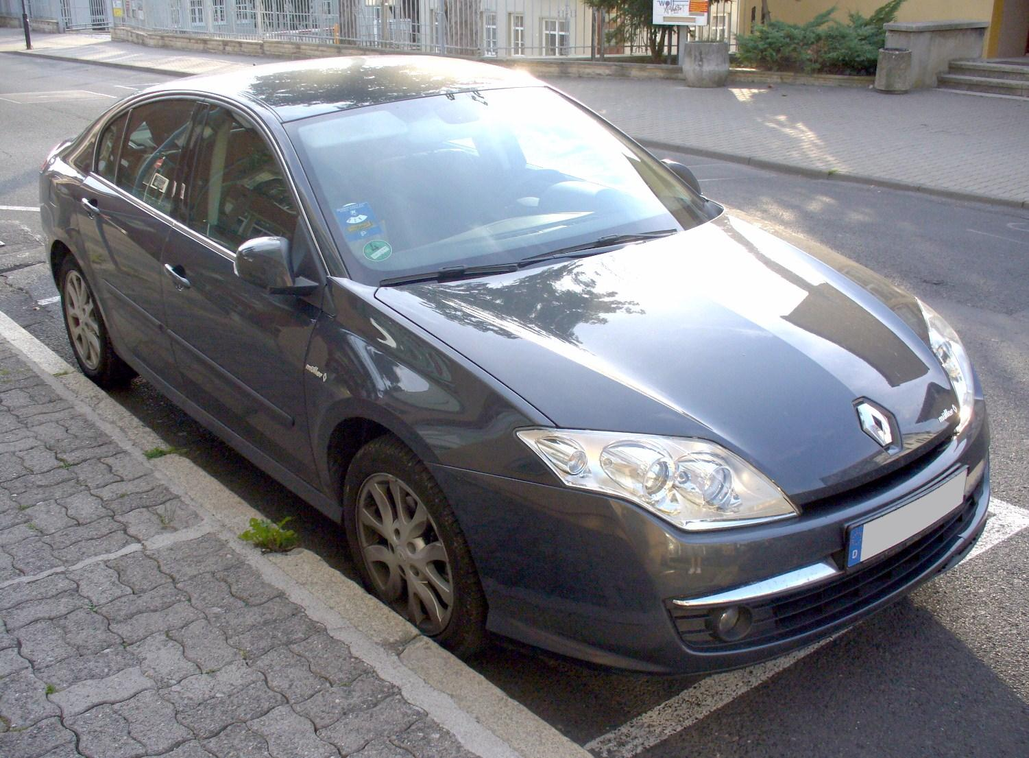 Renault Laguna III